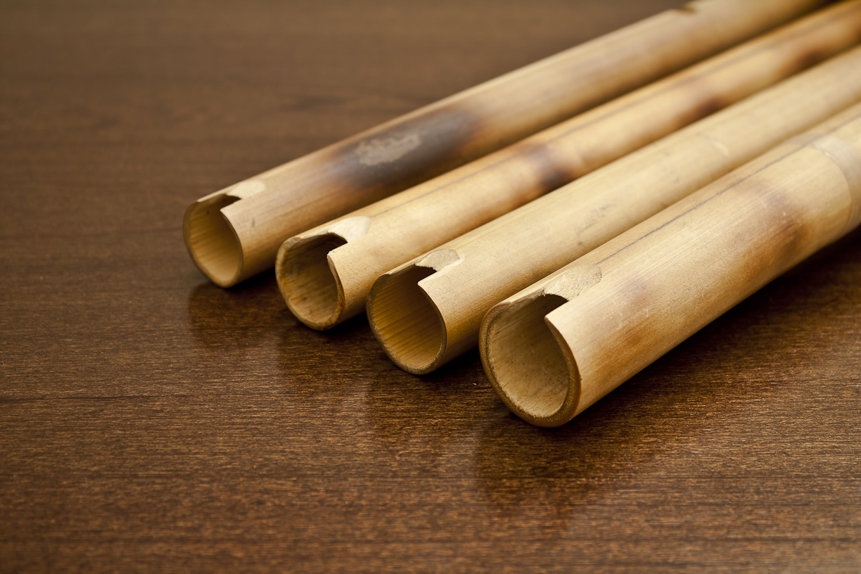 Tropa de quena quena